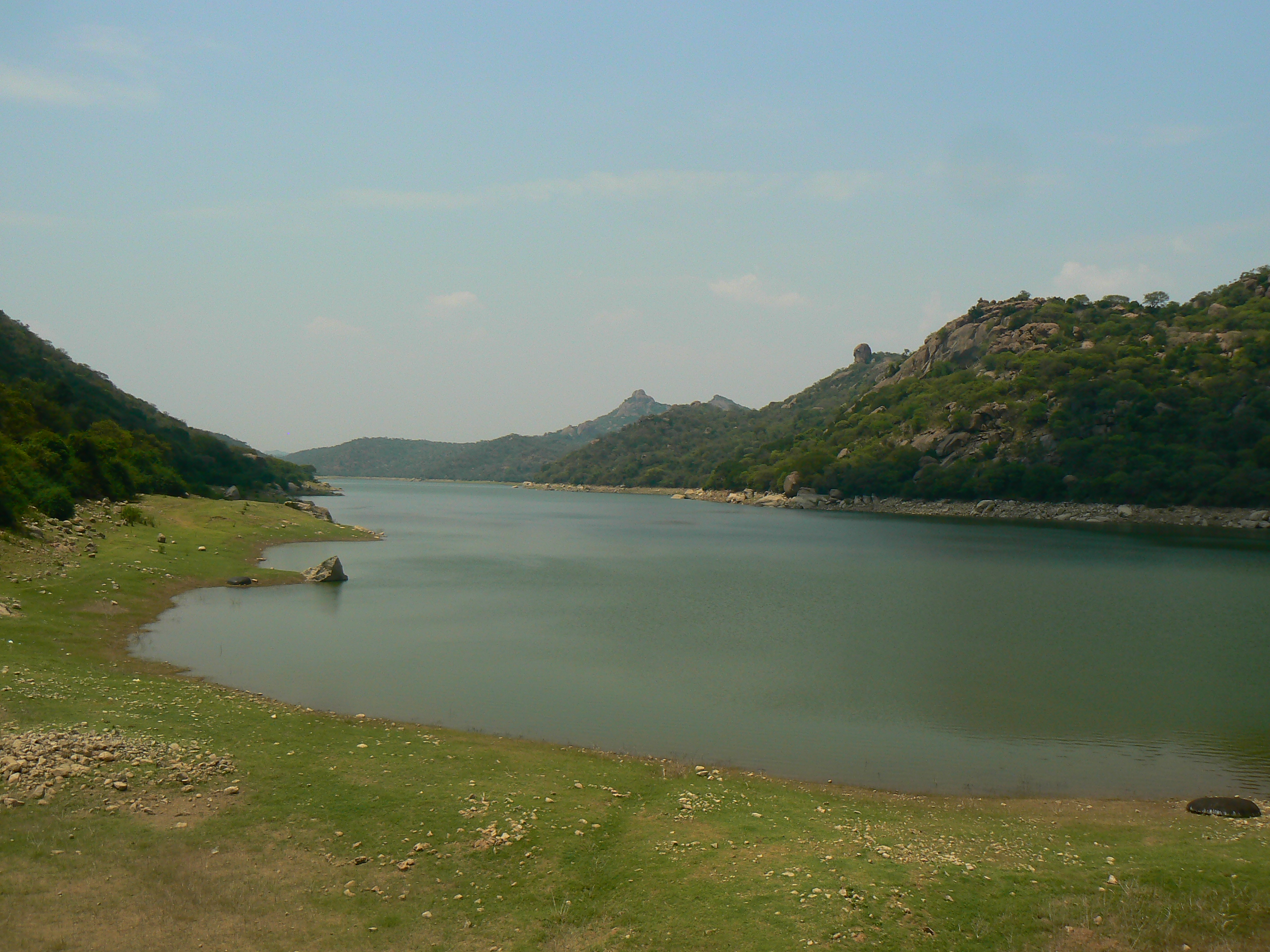 Calm catchment at Panchapali Dam near Denkanikottai